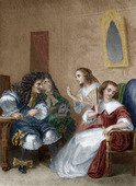 Précieuses